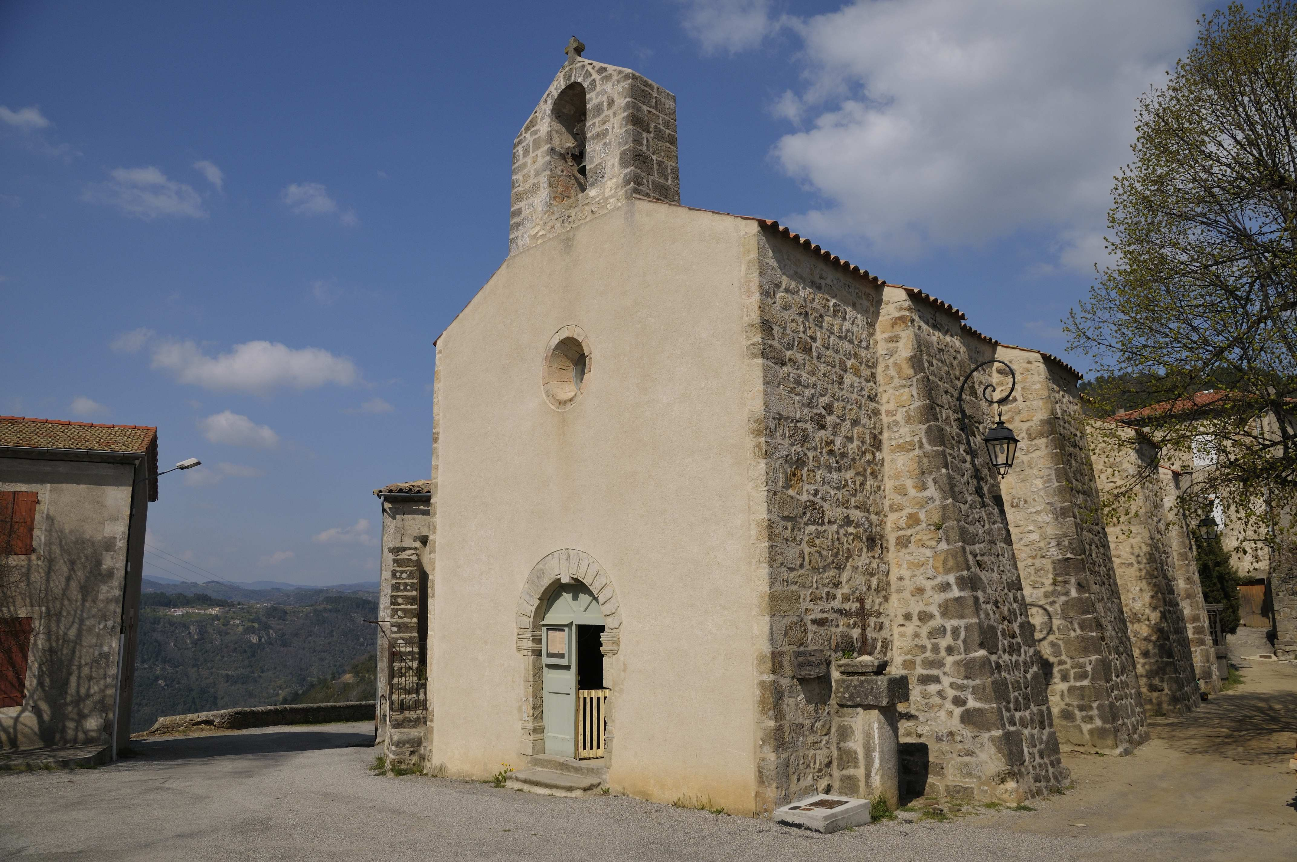 église de saint Vincent de Durfort